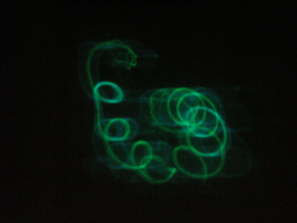 Volumetric movie